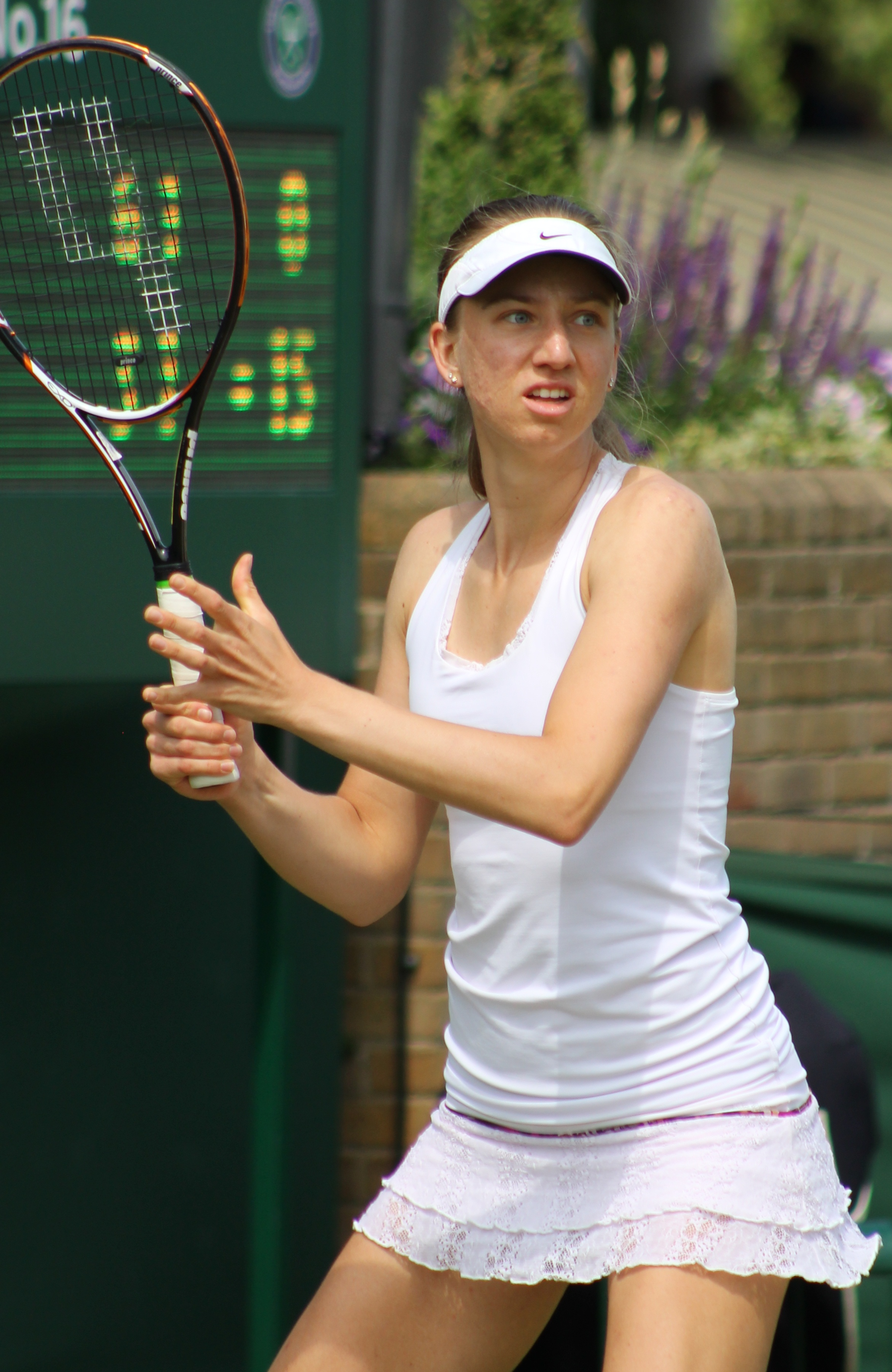 Emiliàn e rumagnòl: La Mona Barthel tòlta śò durànt al turnèo ad Wimbledon dal 2013